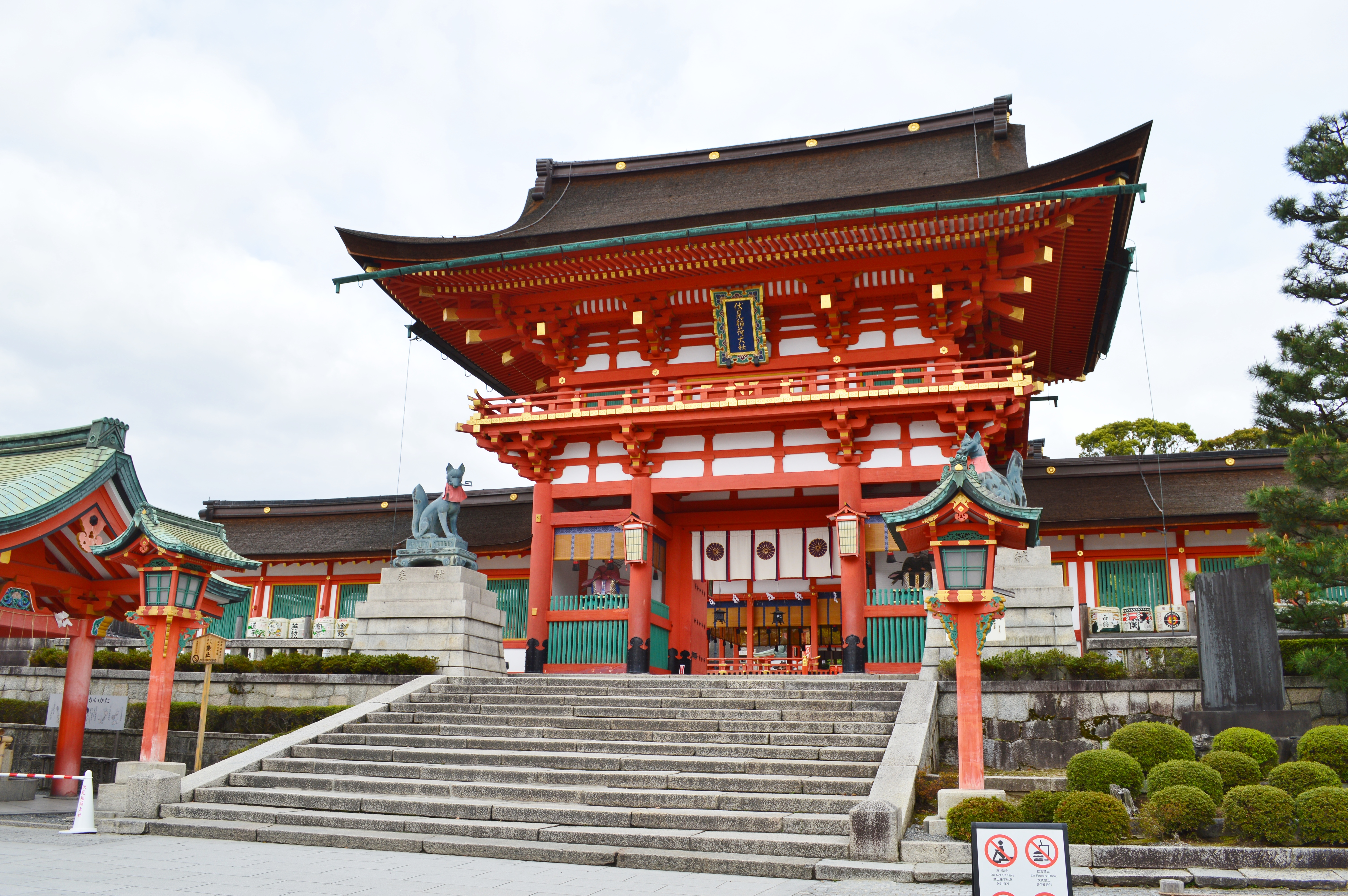 伏見稲荷大社 楼門 Nikon D3200